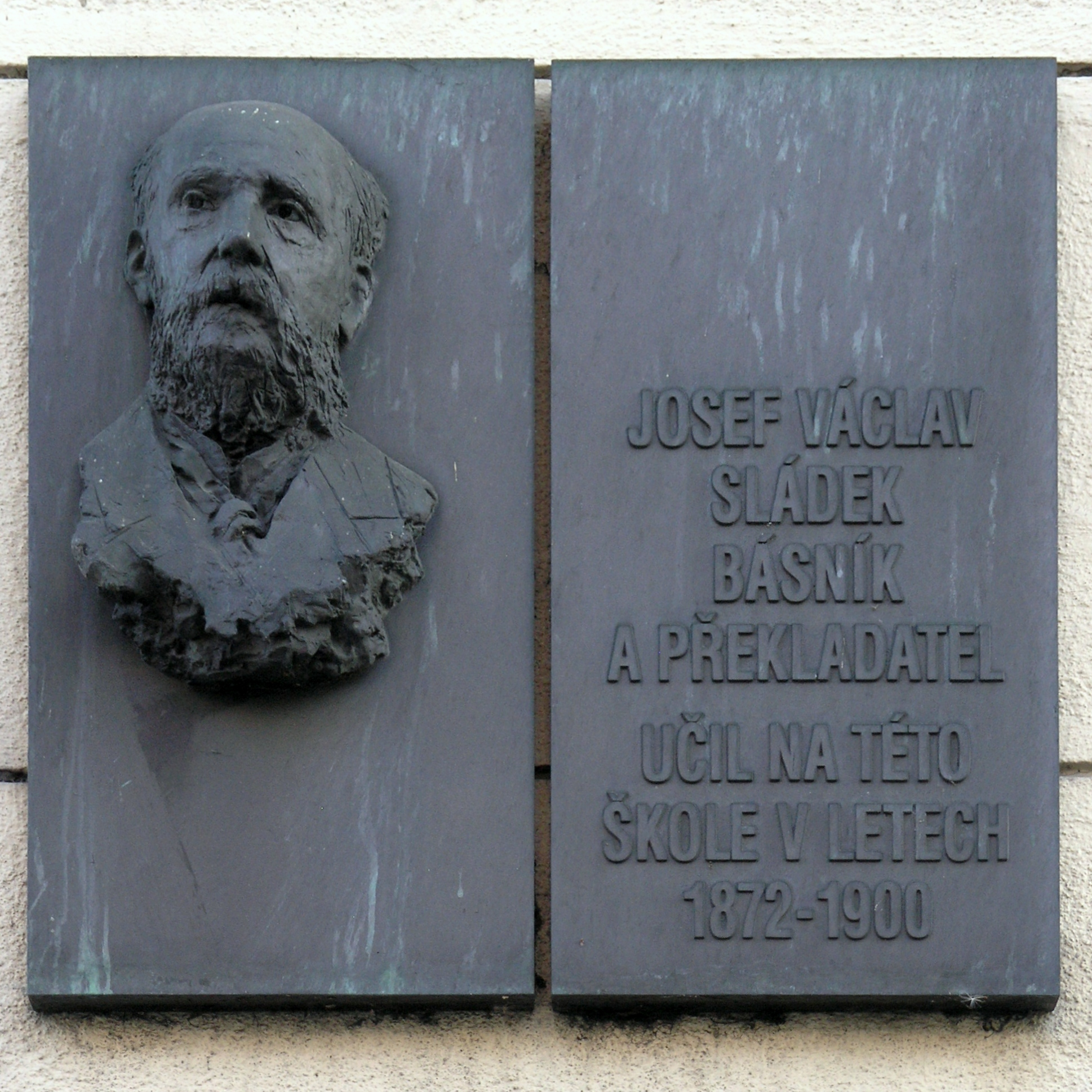 Praha, Nové Město - Resslova (pamětní deska Josefa Václava Sládka)